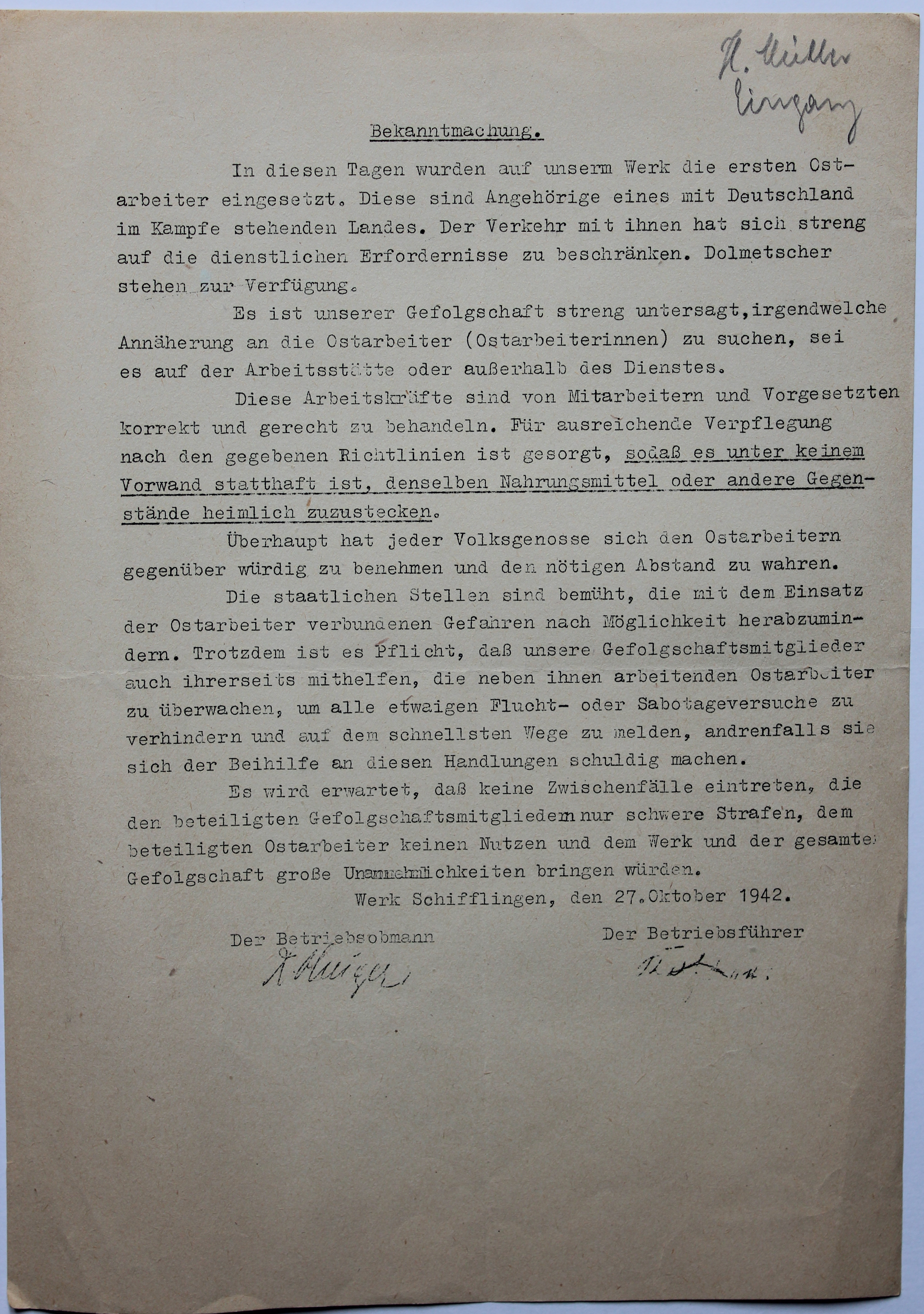 Circulaire vun der Direktioun vun Arbed Schëffleng, ënner däitscher Besatzung, vum 27. Oktober 1942, an där d'Personal informéiert gëtt, datt sg. "Ostarbeiter zum Asaz kéimen, a wéi ee sech hinne géintiwwer behuele soll.